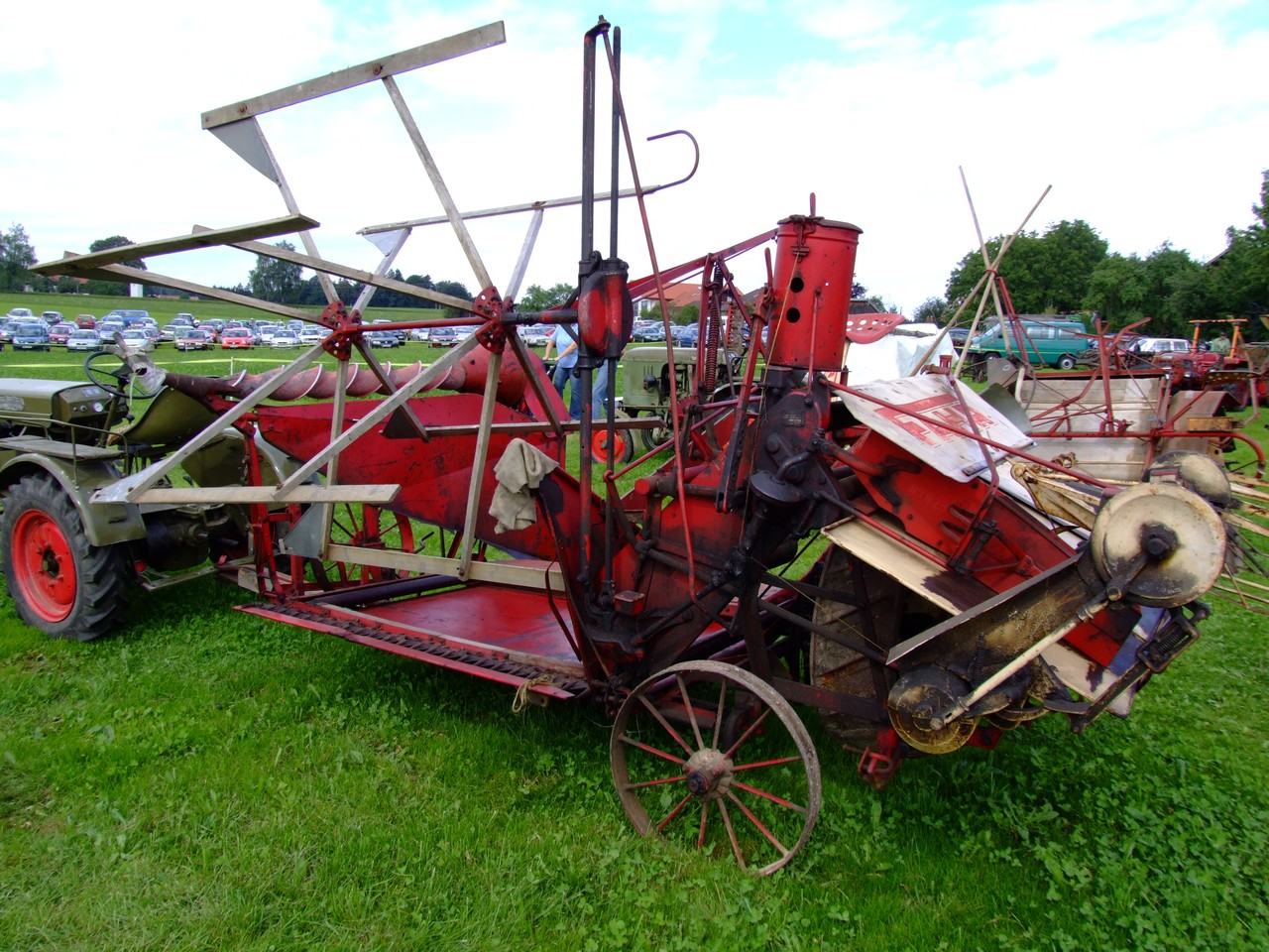 Fahr-Mähbinder B5NR in Transportstellung